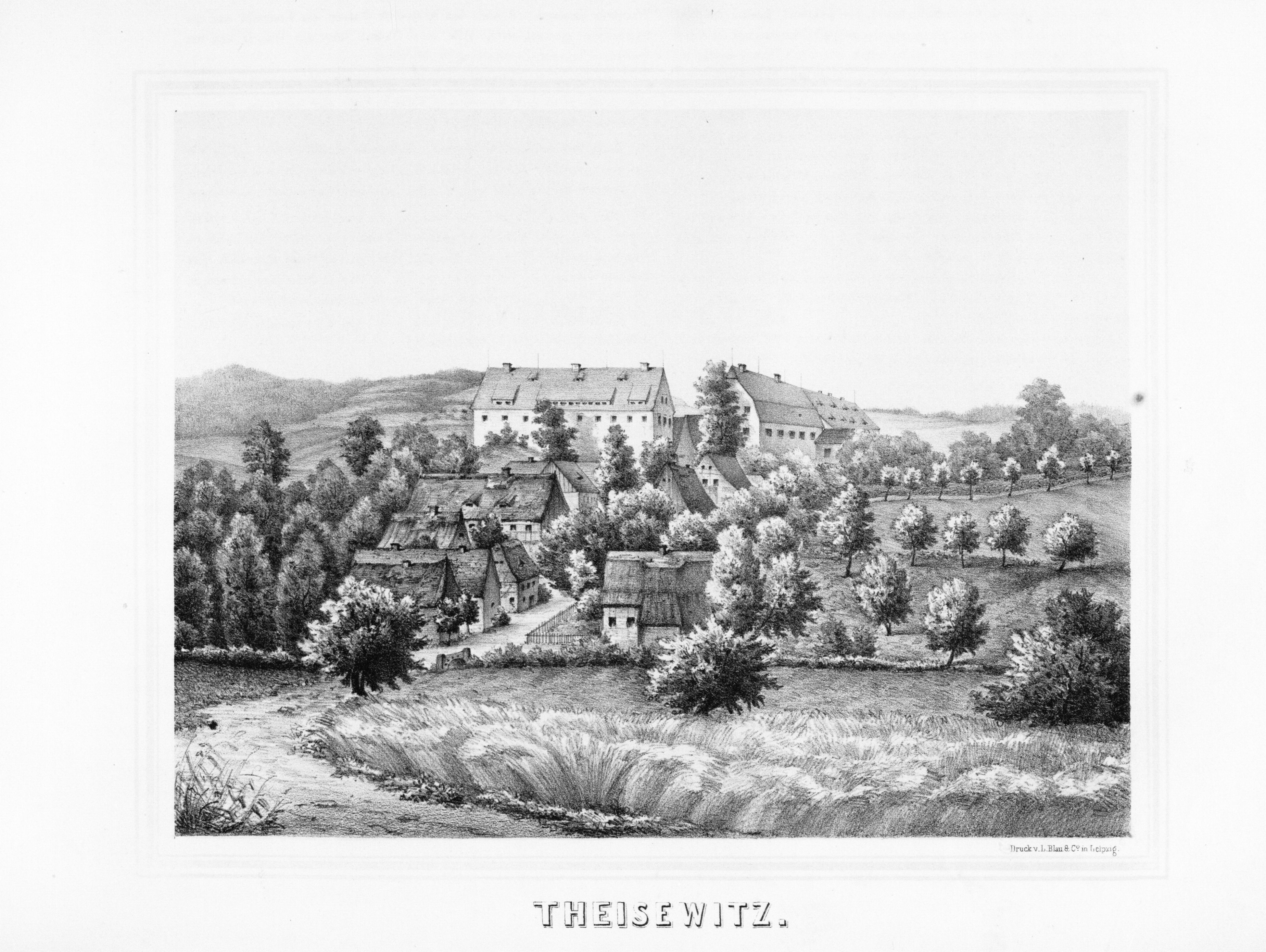 Theisewitz aus: Album der Rittergüter und Schlösser im Königreiche Sachsen Meissner Kreis Section: II